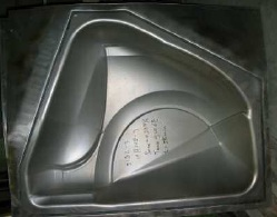 Pieza